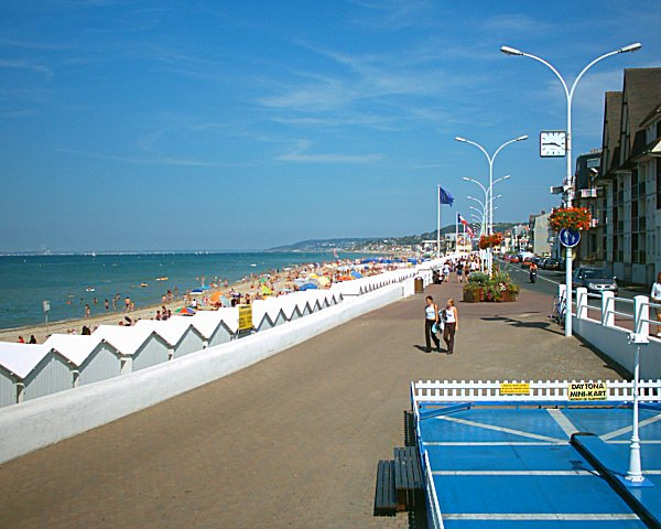 Villers-sur-Mer beach.